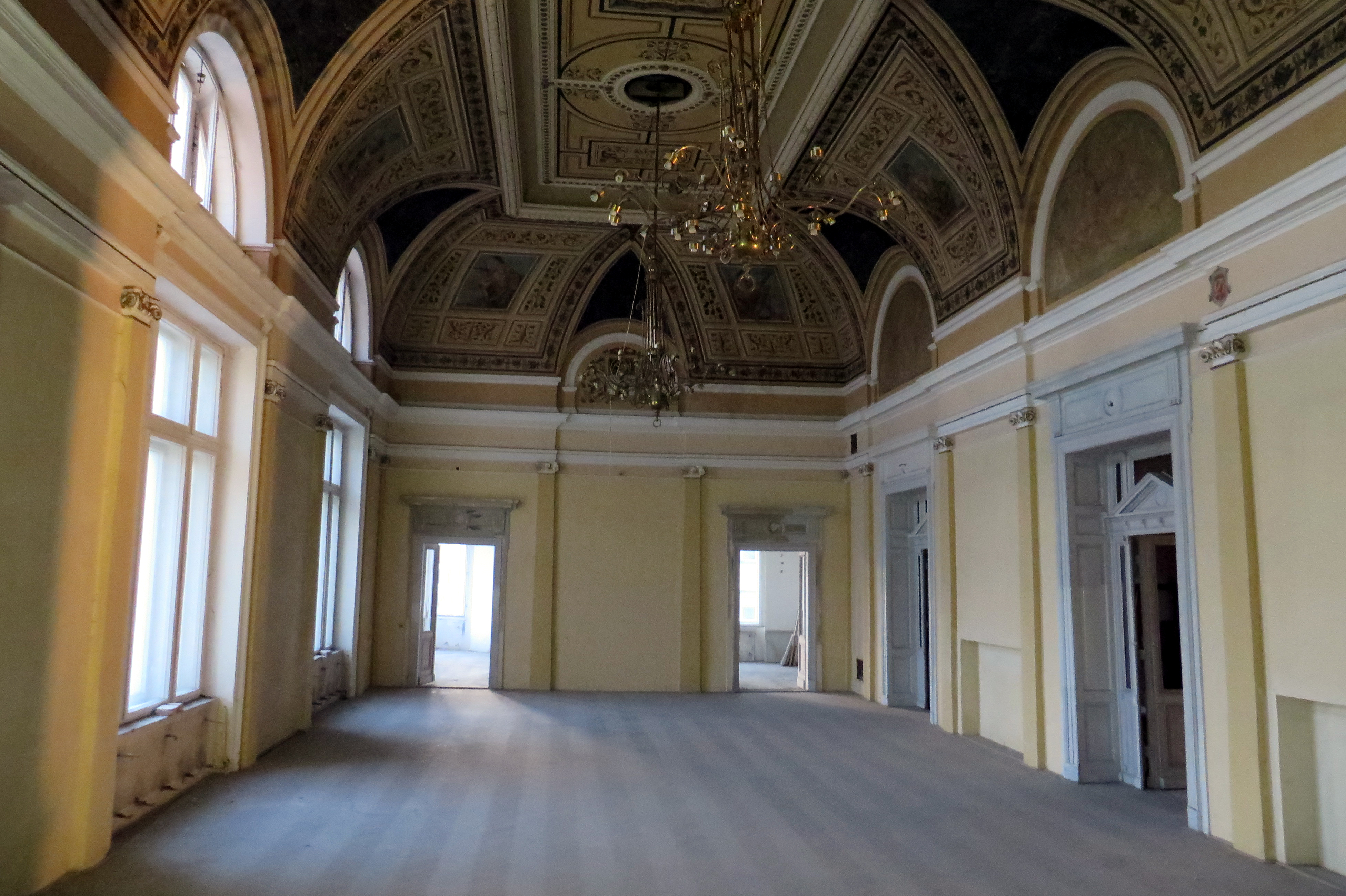 Interiér Občanské záložny v Poděbradech. Taneční sál.